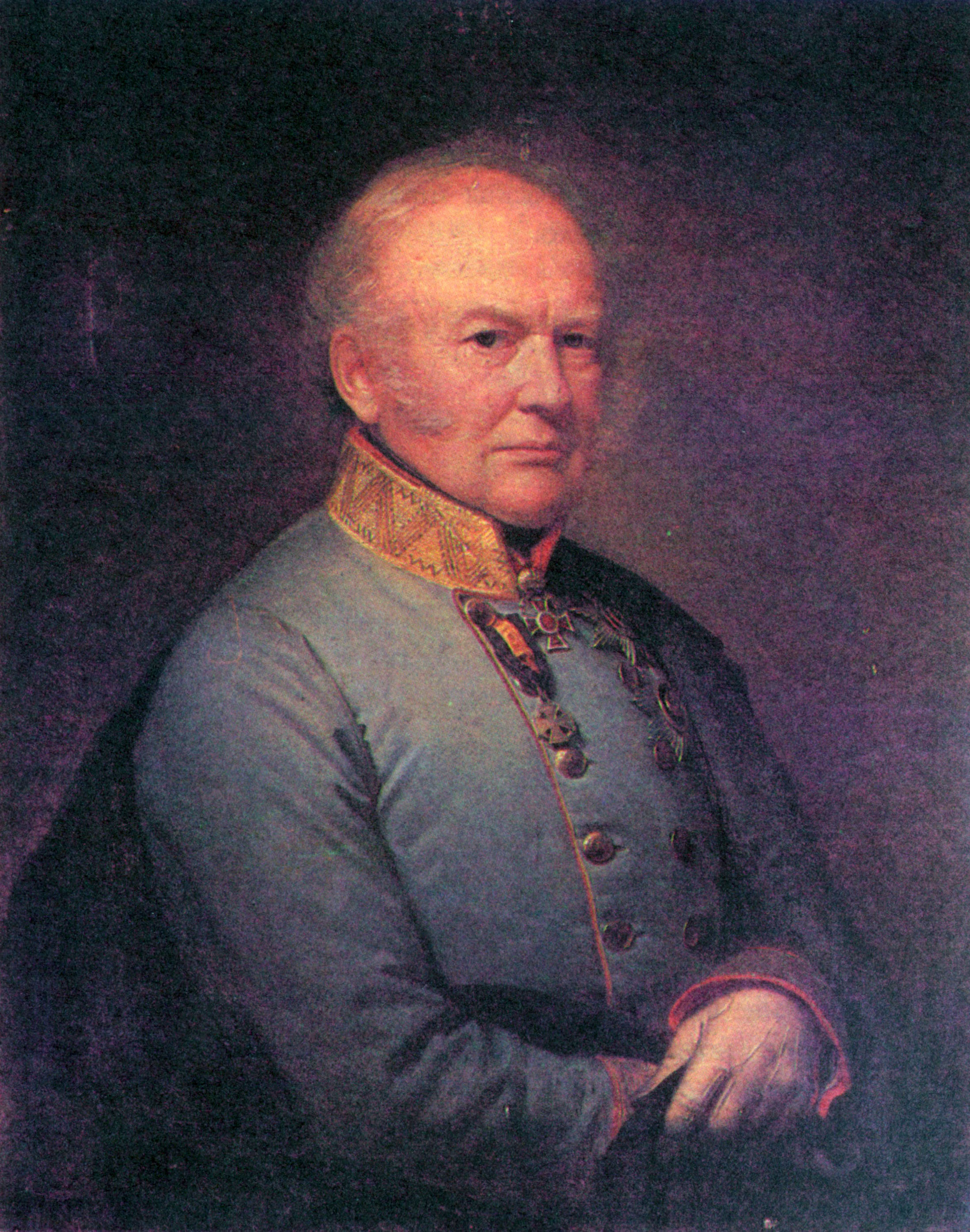 Karl Ludwig von Ficquelmont